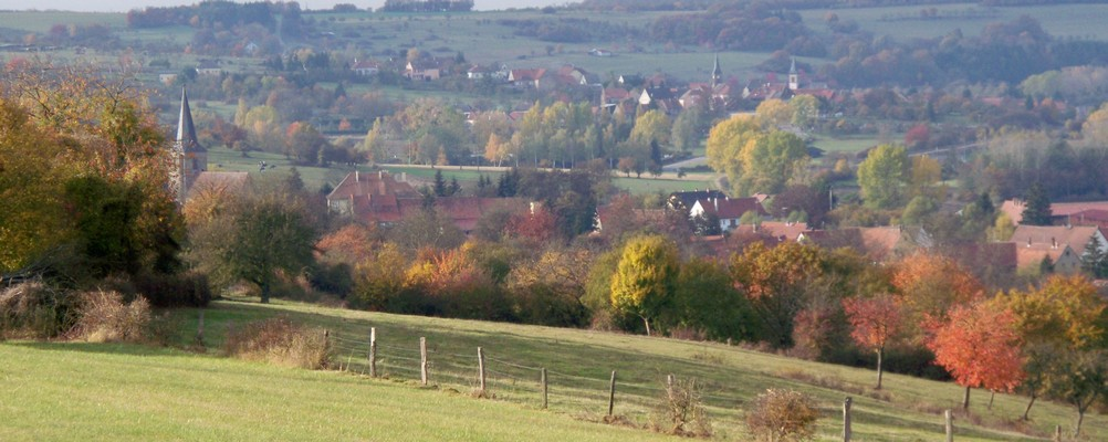 vue générale en automne